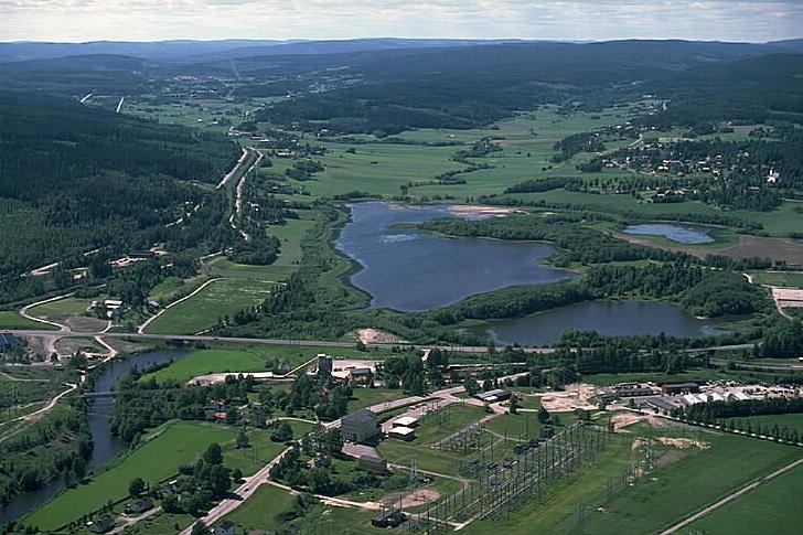 Motiv: Selånger-Kungsnäs Nyckelord: Flygbilder, Riksintressen Kategori: JordbruksbySelånger-Kungsnäs